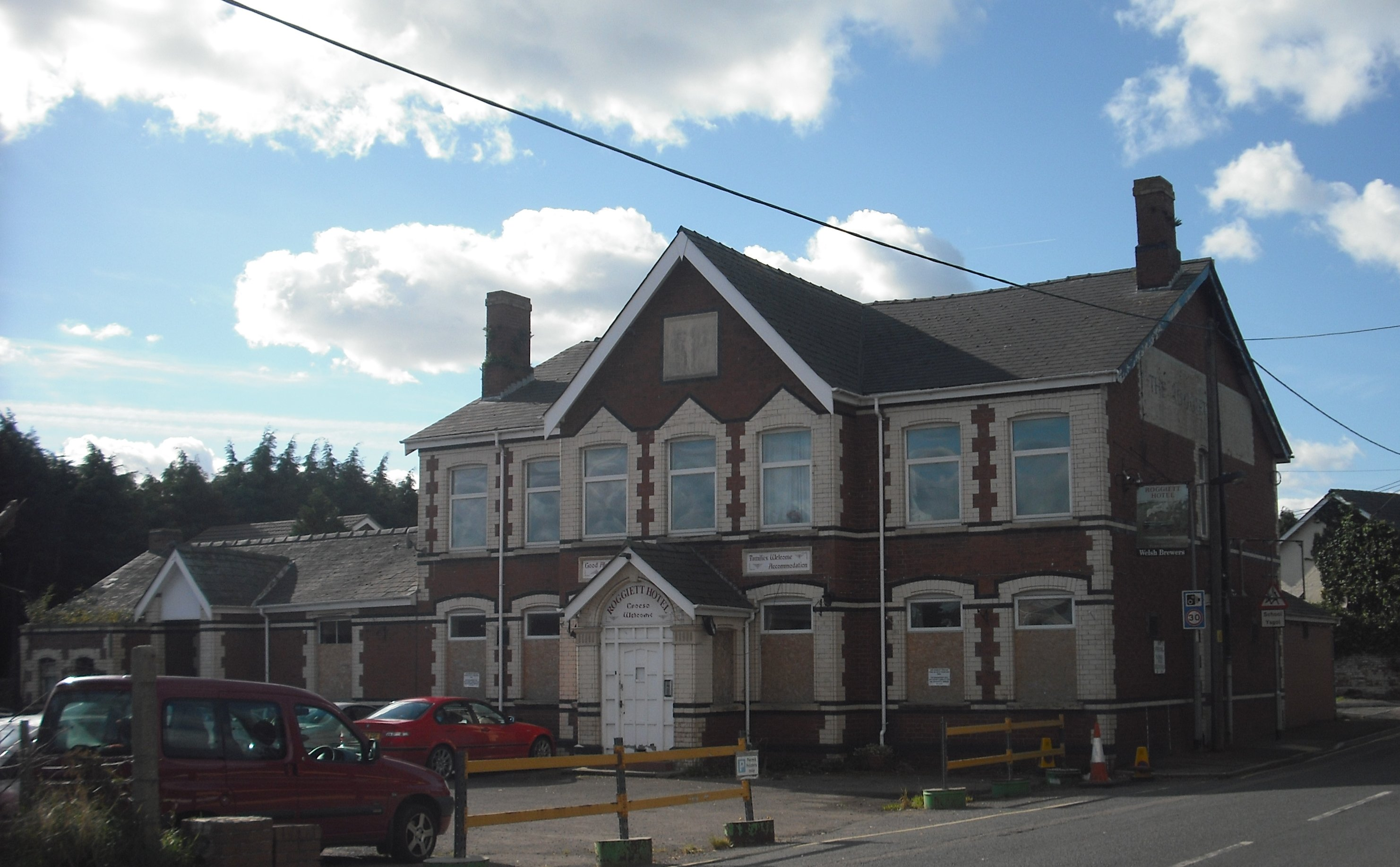 The Roggiett Hotel at Rogiet.